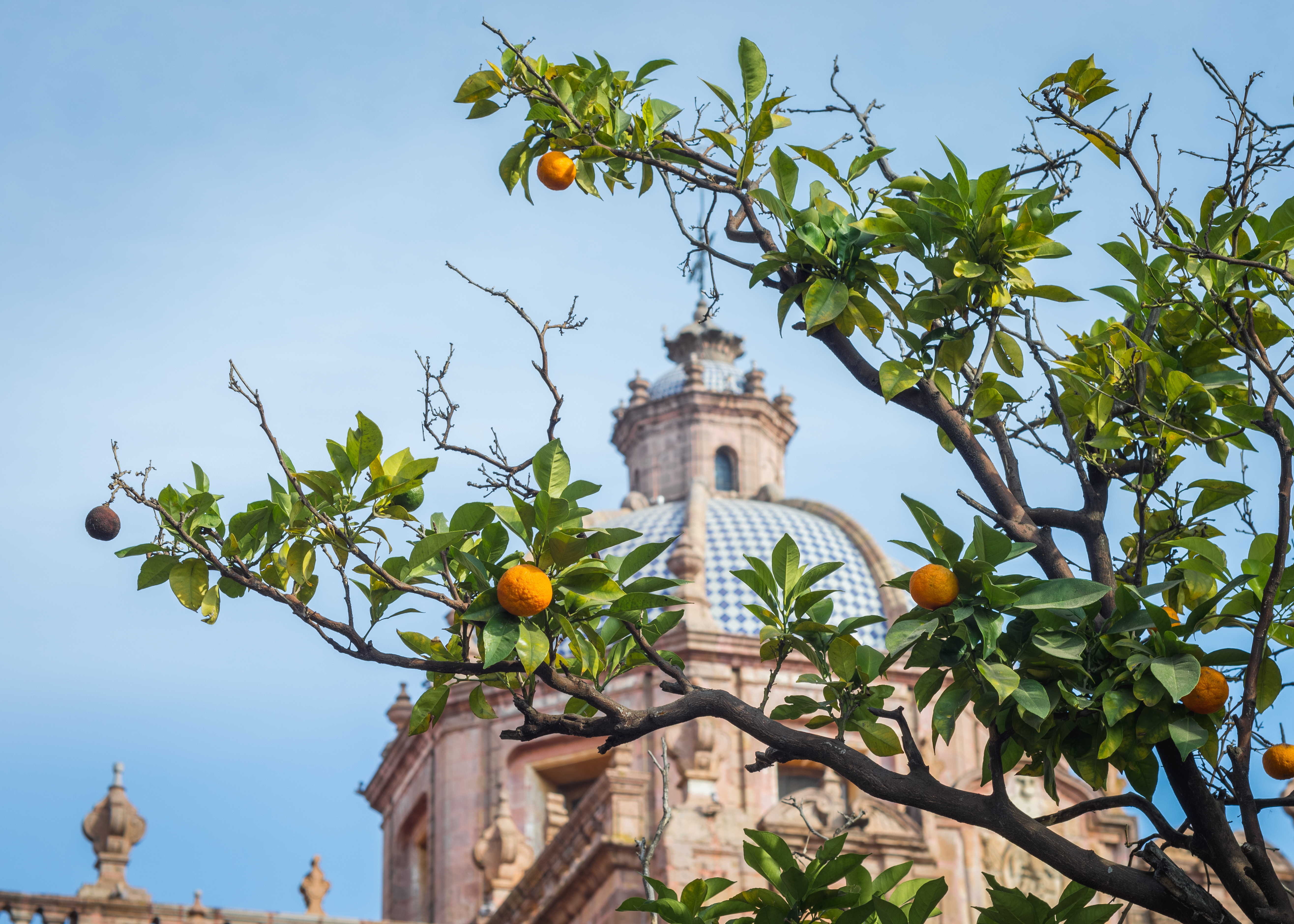 Cúpula central desde la entrada poniente.